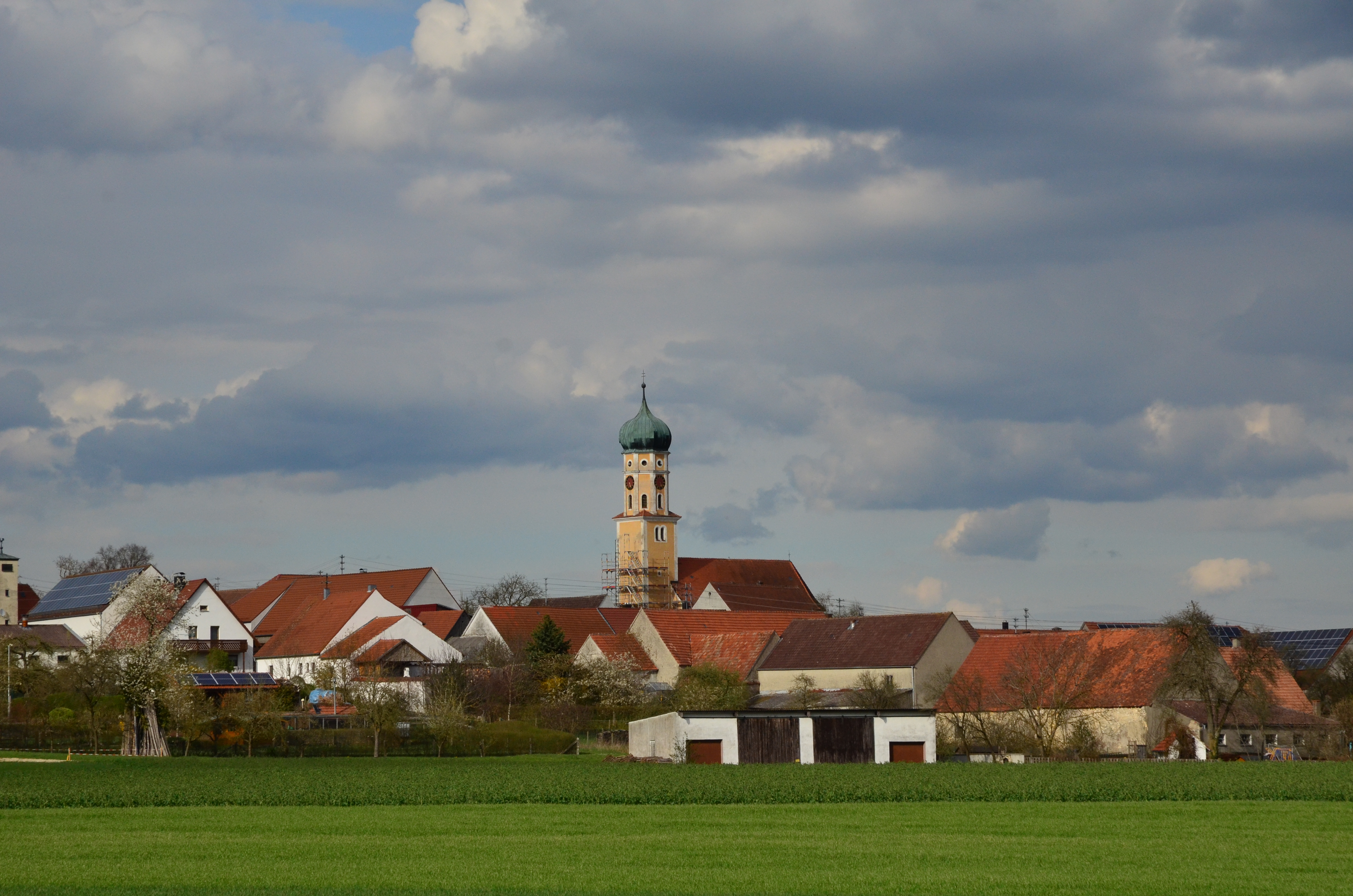 Ansicht von Bollstadt, Ortsteil vom Amerdingen mit der Katholische Pfarrkirche St. Ulrich